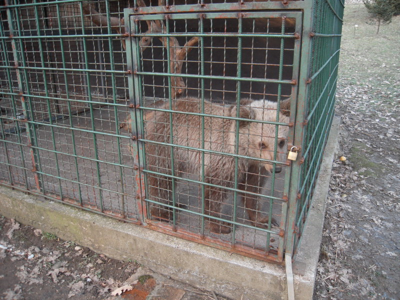 Zoo Banja Luka